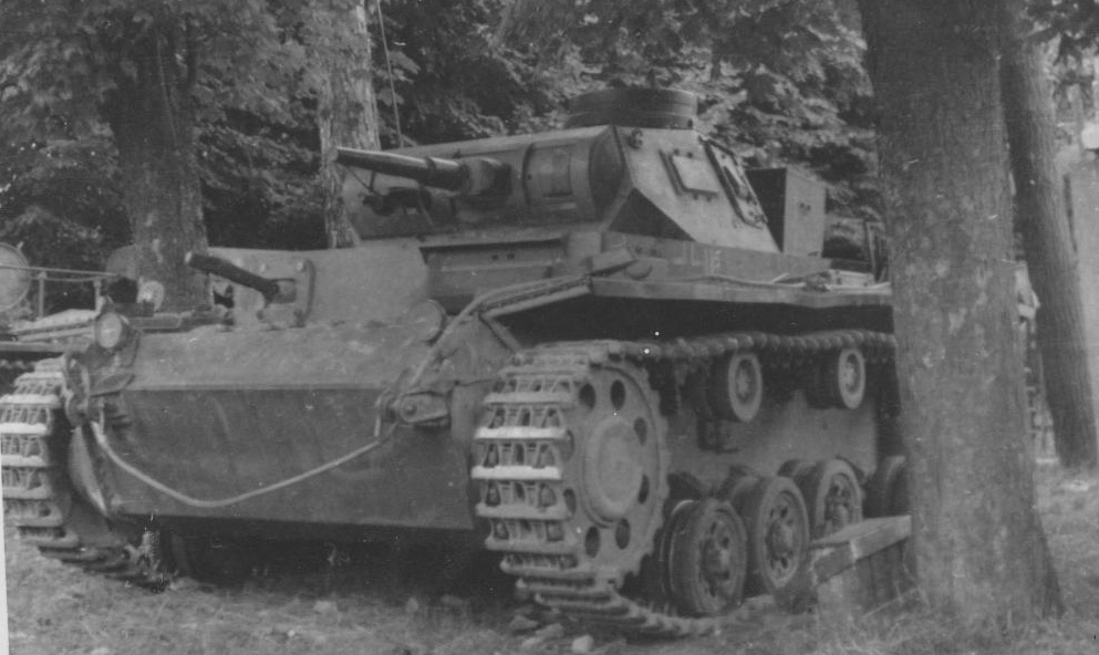 Panzerkampwagen III Ausführung E mit Turm der Ausführung D